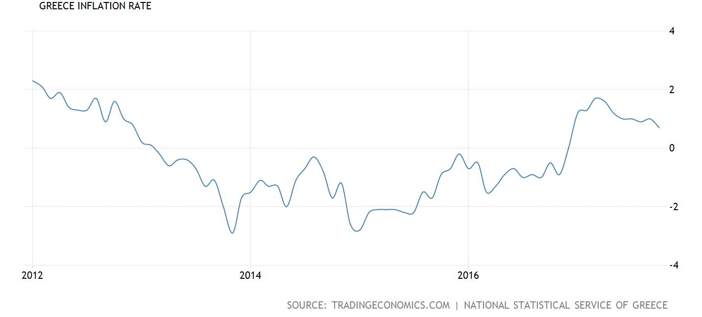 Greece Inflation Rate, 2012-2017, Source: Trading Economics